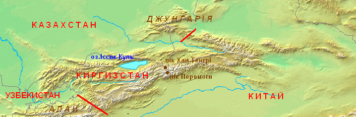 Мапа Тянь-Шаню